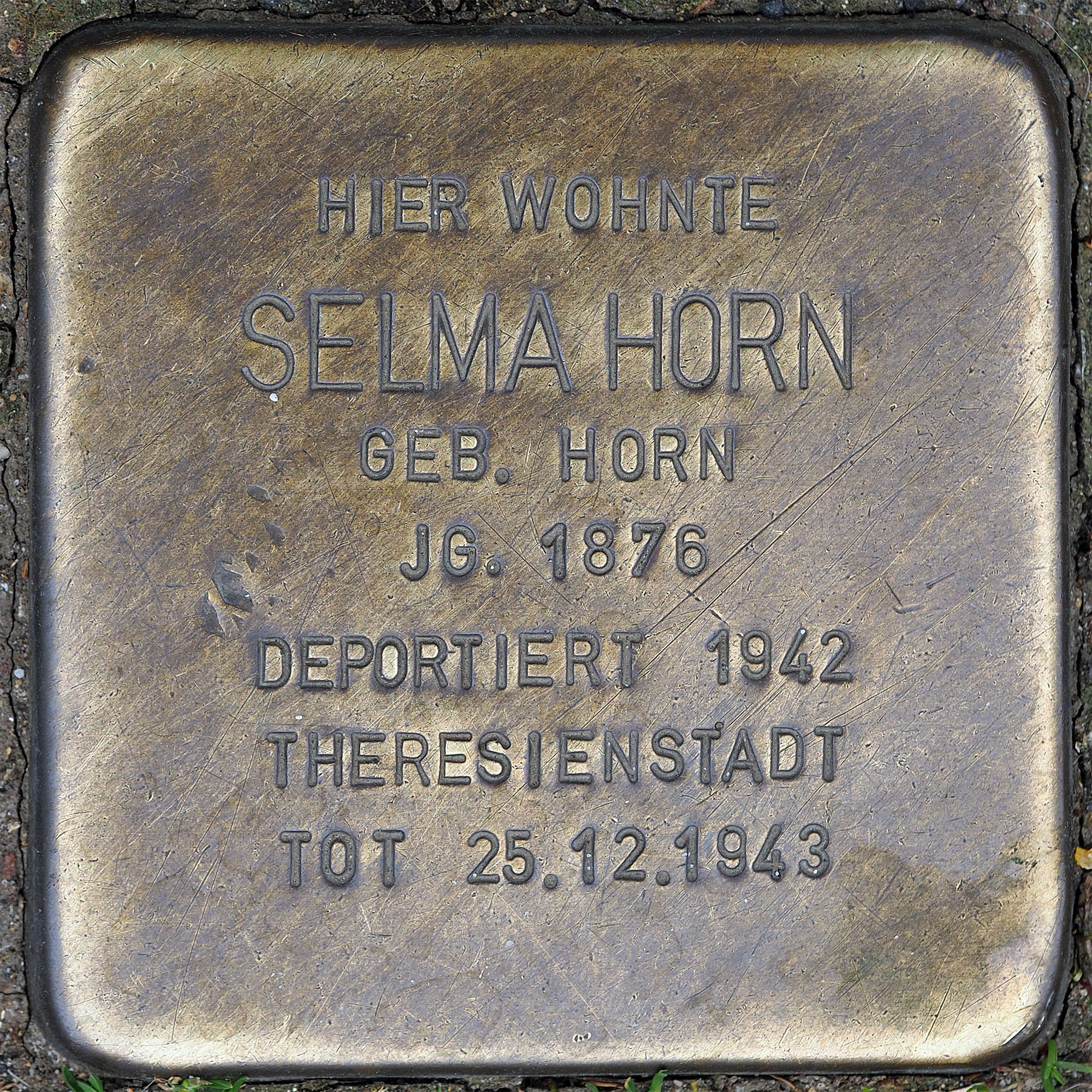 Stolpersteine MG: Horn, Selma